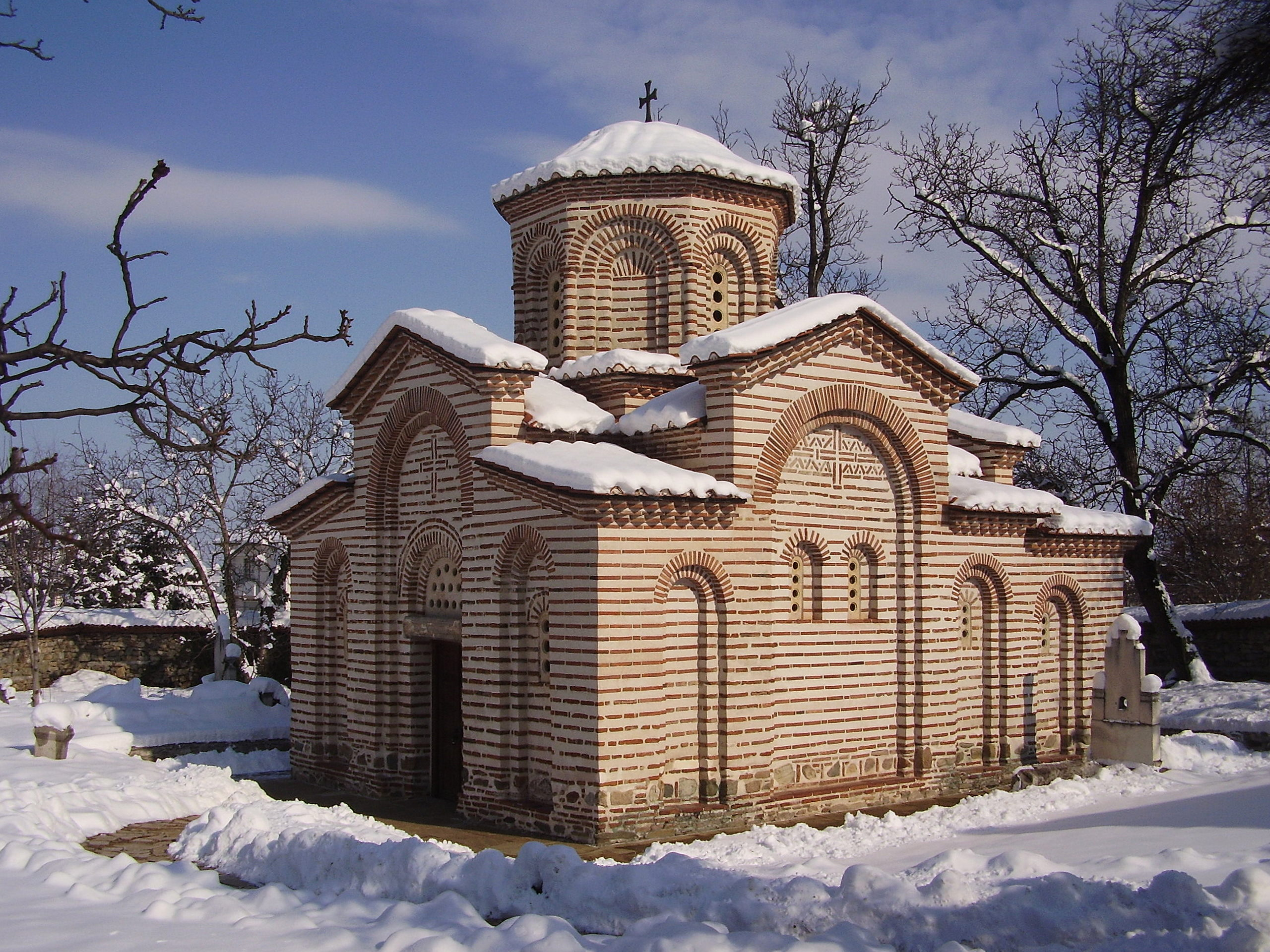 Църквата "Свети Георги" - Кюстендил